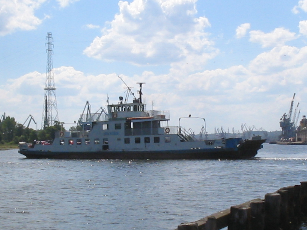 Ferry at Wisłoujście, Gdansk, Poland